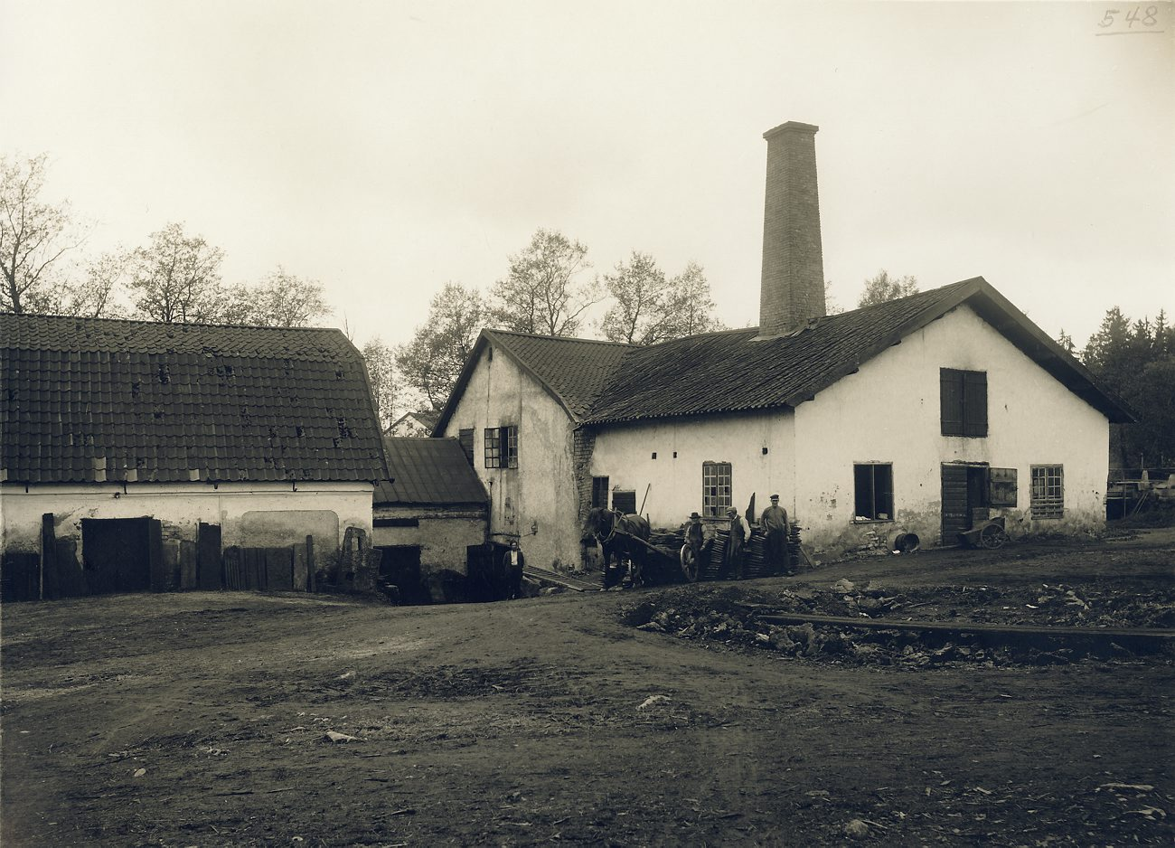 A4356. Smältsmedjan vid Larsbo Järnbruk, 1900.